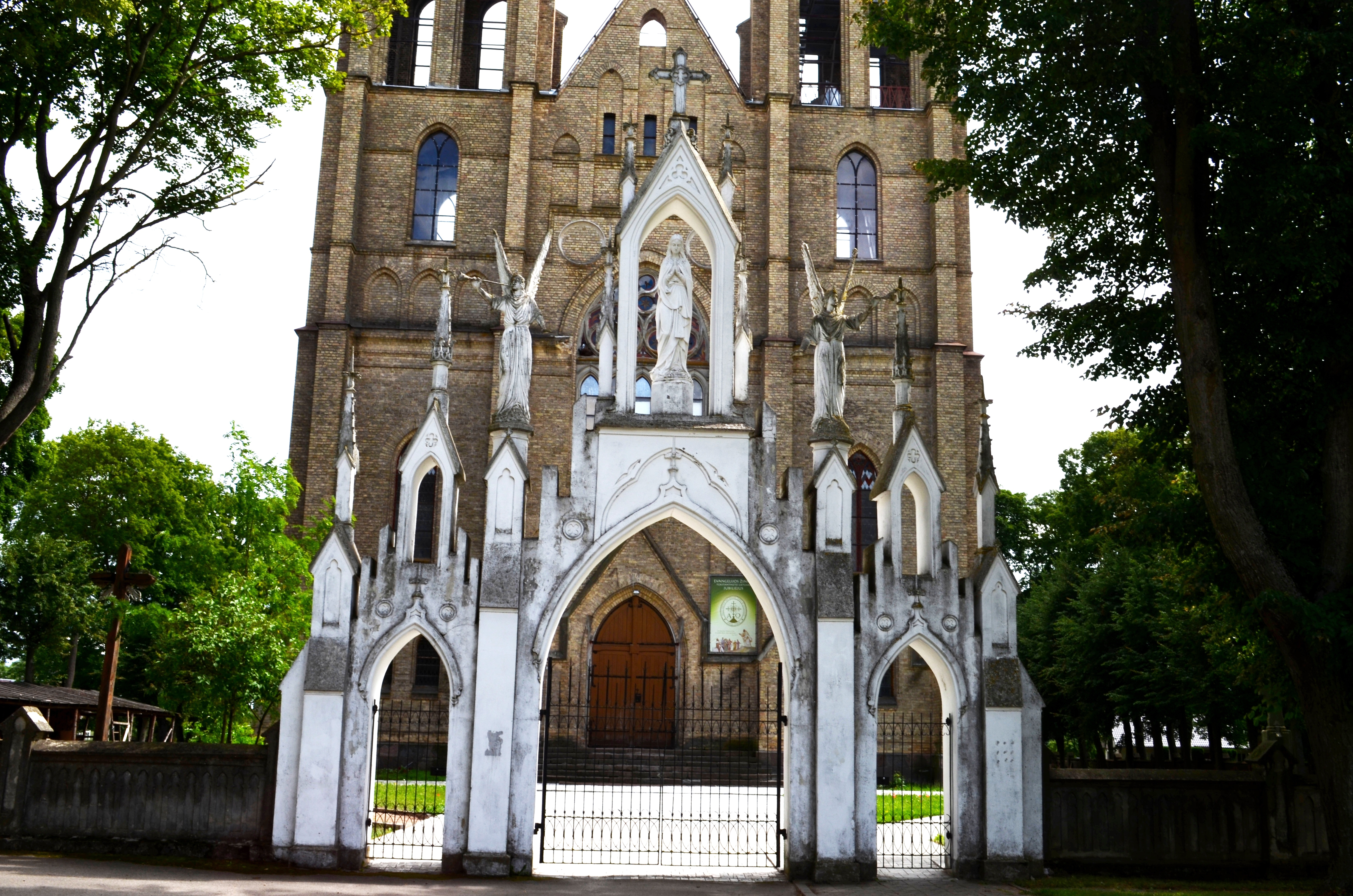 Bažnyčios vartai, Naujamiestis, Panevėžio raj.